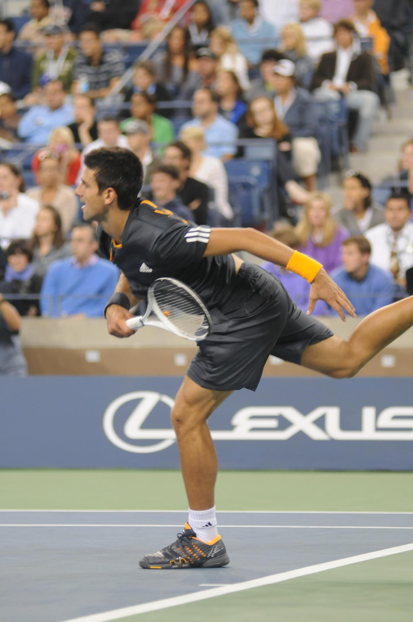 Novak Đoković at the 2009 US Open